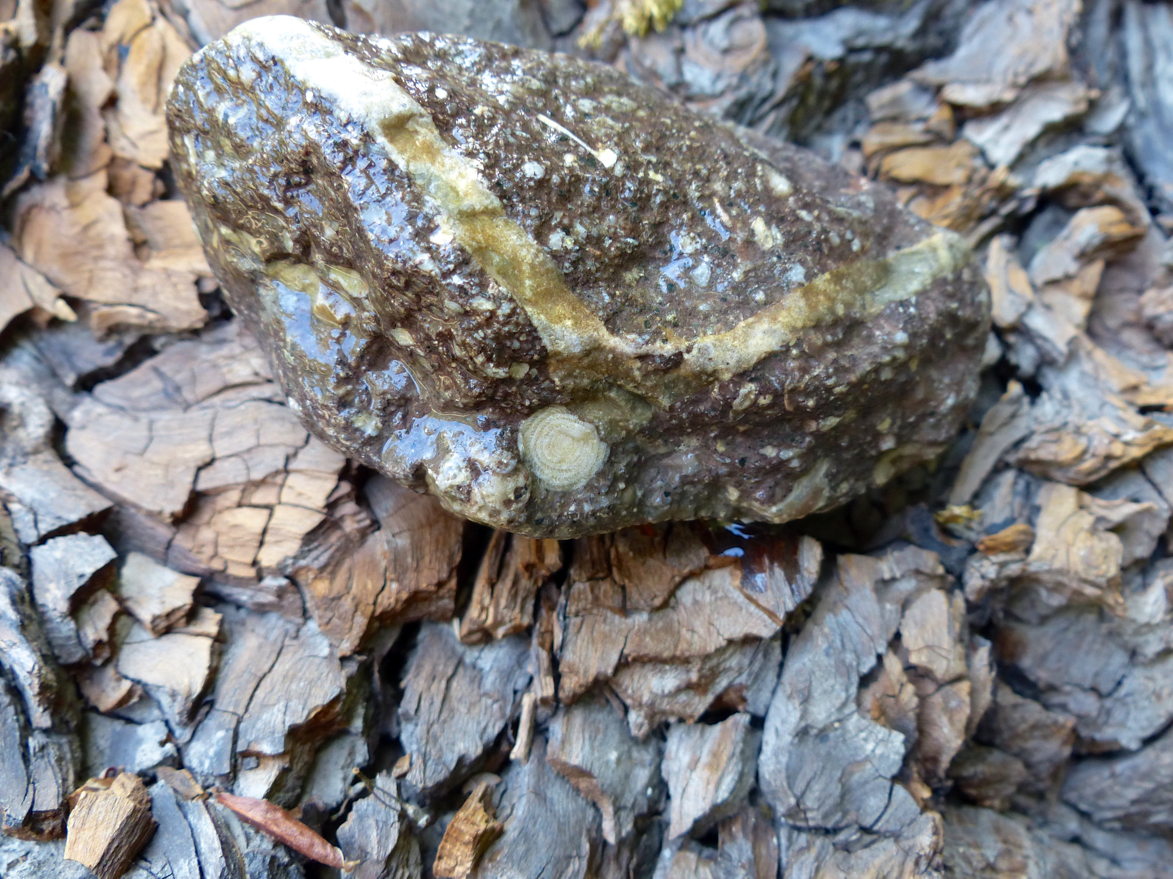 WikiProjekt Landstreicher Starzlachklamm: Nummulitenkalk